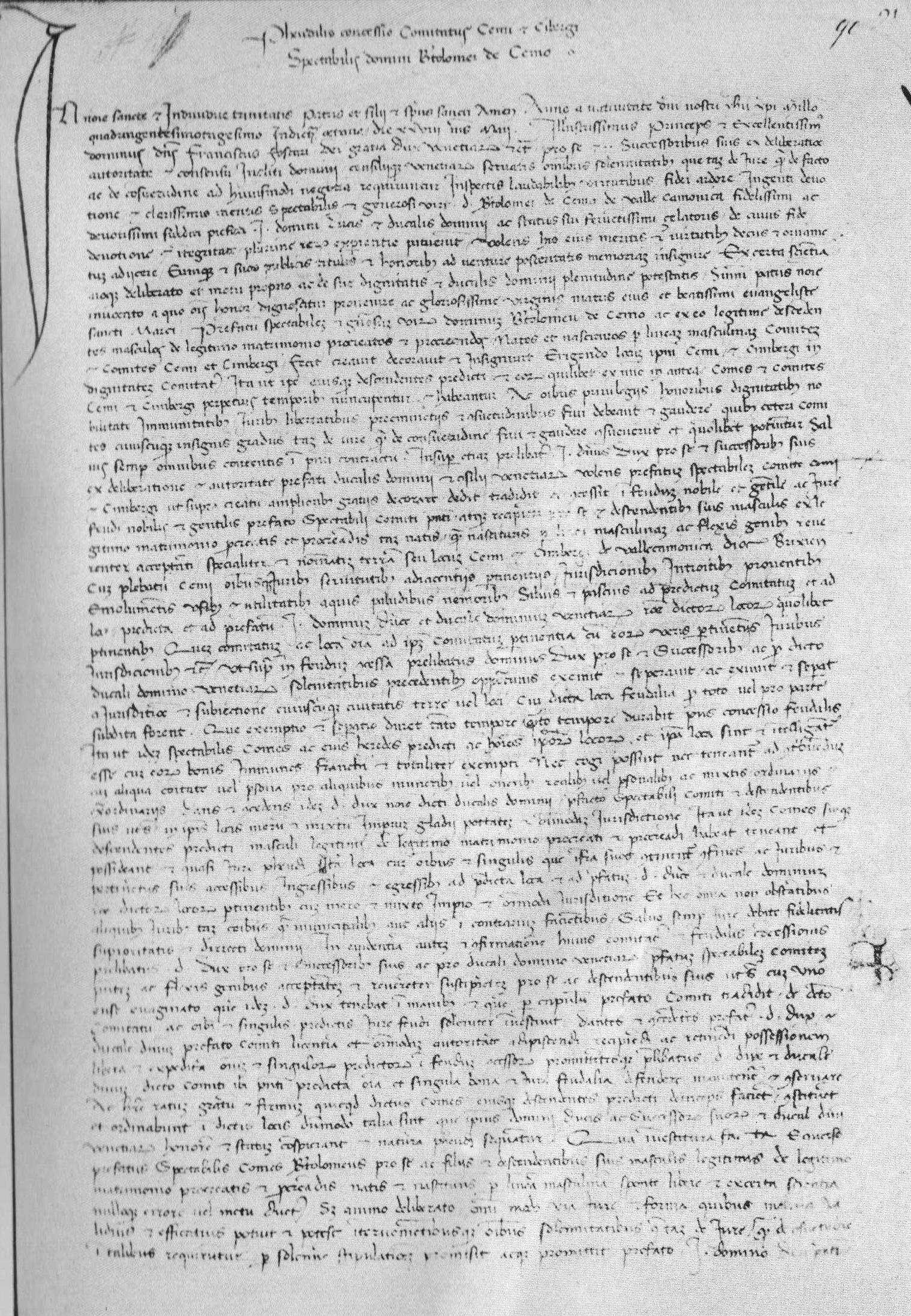 Bartolomeo da Cemmo privilegiato della contea di Cemmo e Cimbergo